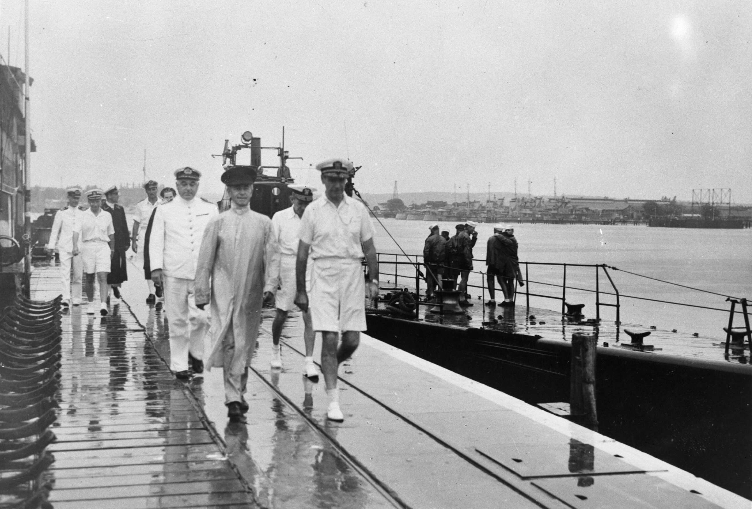 Collectie / Archief : Fotocollectie Anefo Reportage / Serie : [ onbekend ] Beschrijving : Aankomst van de Amerikaanse admiraal Thomas C. (Tommy) Hart, commandant ABDACOM, te Soerabaja. Annotatie : Bezoek in 1942 Datum : 1940-1945 Locatie : Indonesië, Indonesië, Java, Nederlands-Indië, Soerabaja Trefwoorden : marine, officieren, tweede wereldoorlog Persoonsnaam : Hart, Thomas C. Fotograaf : Onbekend / Publiek Domein Auteursrechthebbende : Nationaal Archief Materiaalsoort : Negatief (zwart/wit) Nummer archiefinventaris : bekijk toegang 2.24.01.04 Bestanddeelnummer : 935-0137